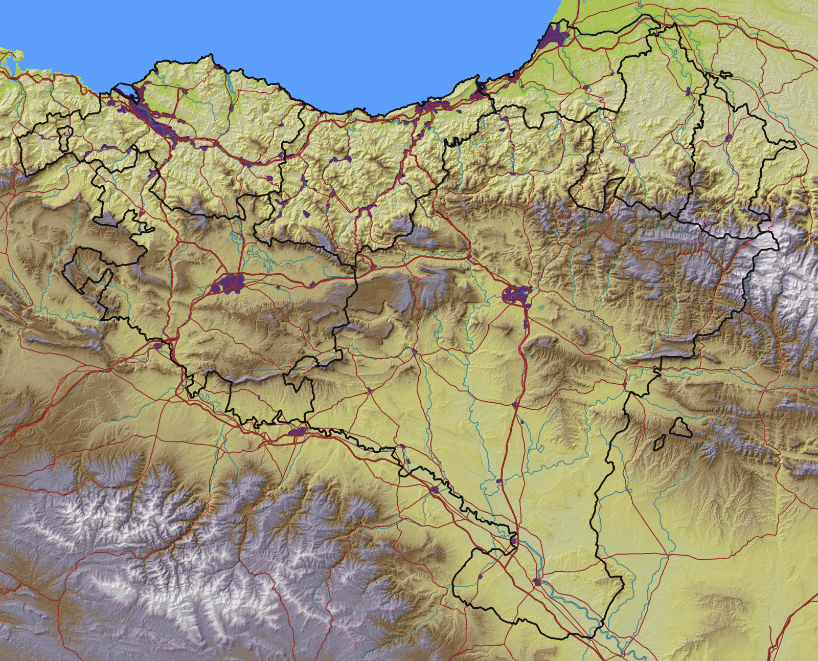 Euskal Herriaren mapa fisikoa